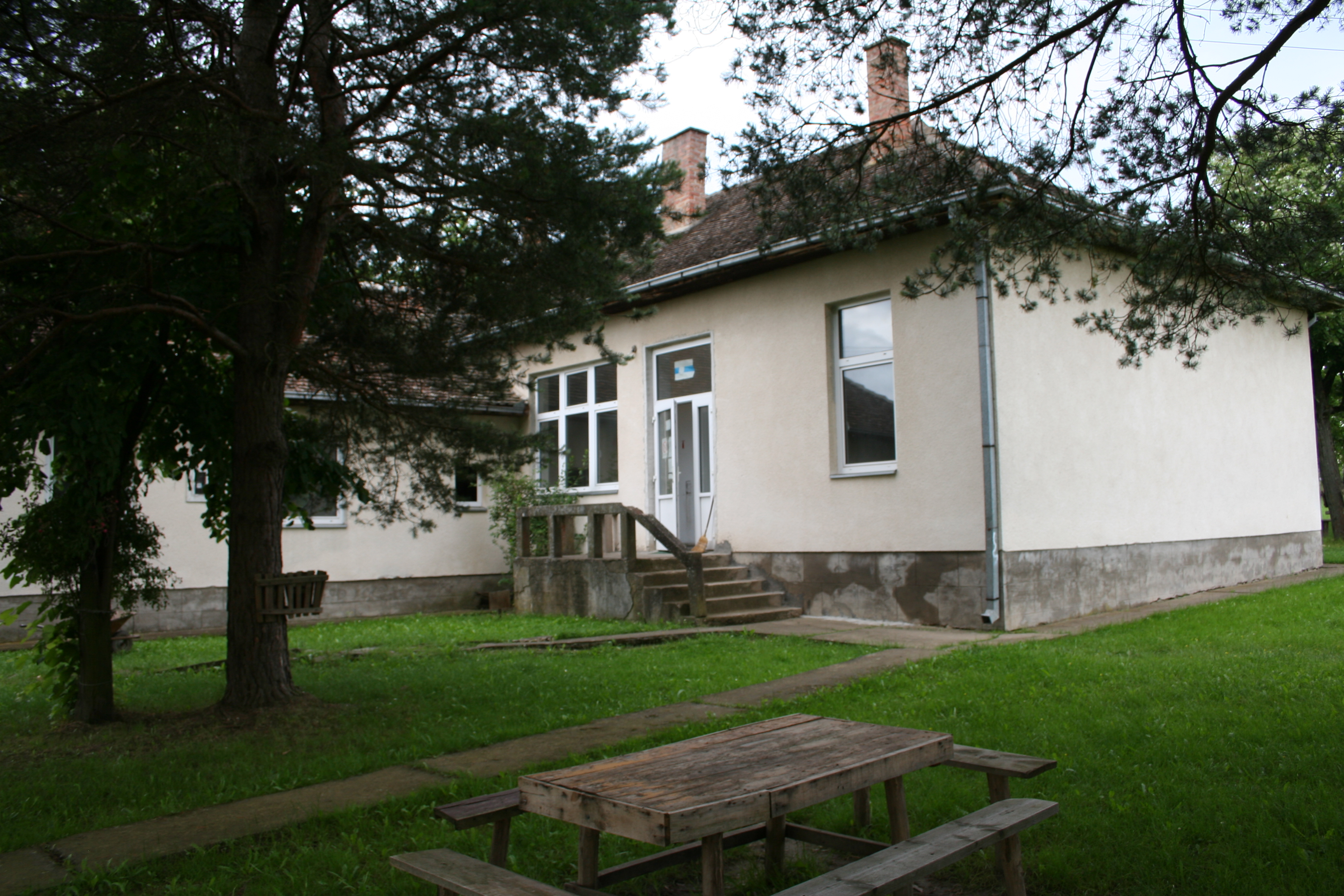 Škola u Pejinoviću, opština Vladimirci